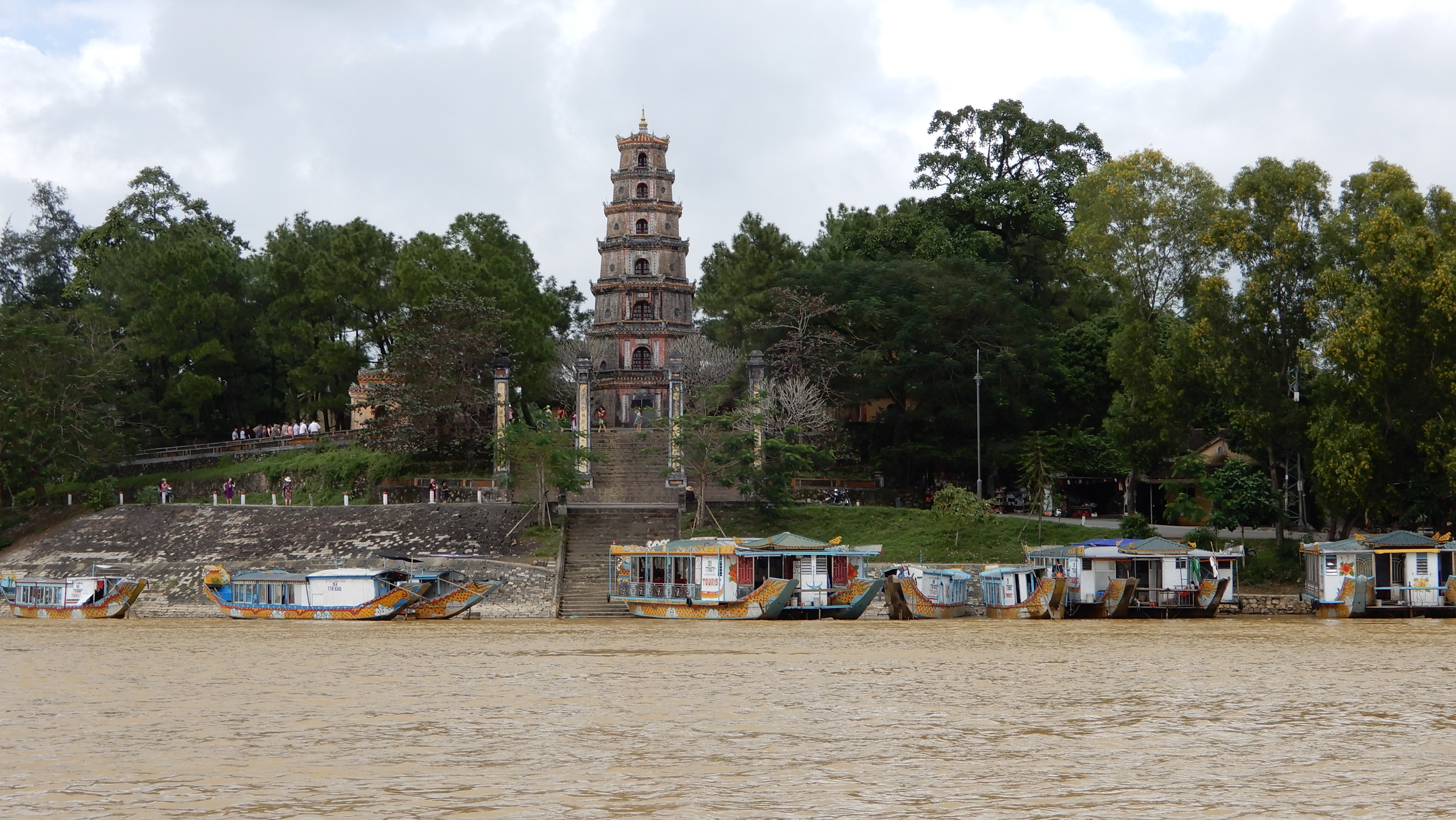 Vietnam, Pagode der himmlischen Frau, Thien Mu-Pagode, Ansicht vom Parfümfluss